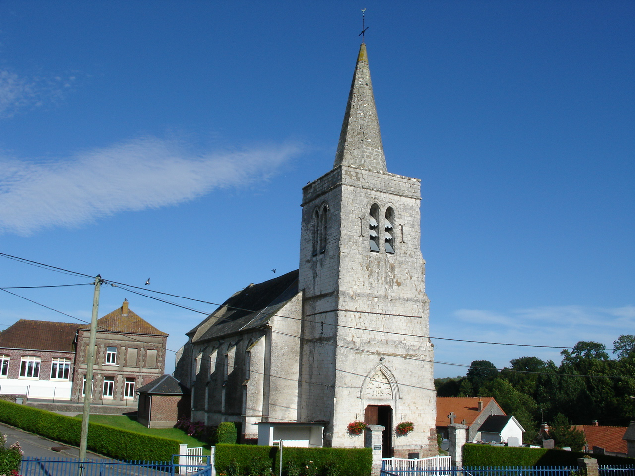 Église de Bayenghem-lès-Seninghem